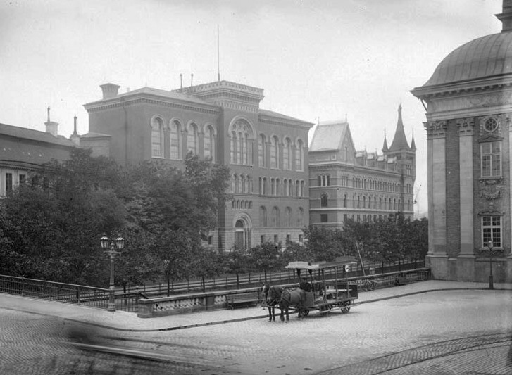 Riddarhustorget med Gamla Riksarkivet och PA Norstedts och Söners tryckeri. T. h. Riddarhuset